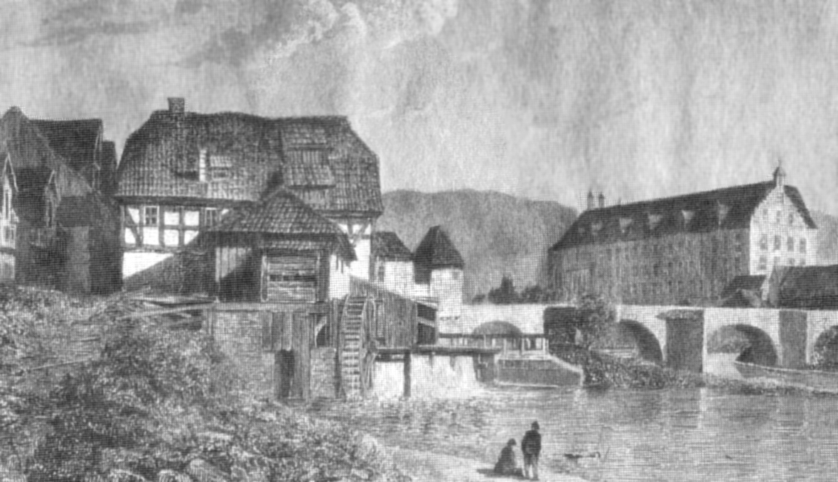 Blümer Mühle, Alte Werrabrücke und Welfenschloss Münden als Stahlstich von Augustin François Lemaître um 1850 nach einer Vorlage von Robert Batty von 1828